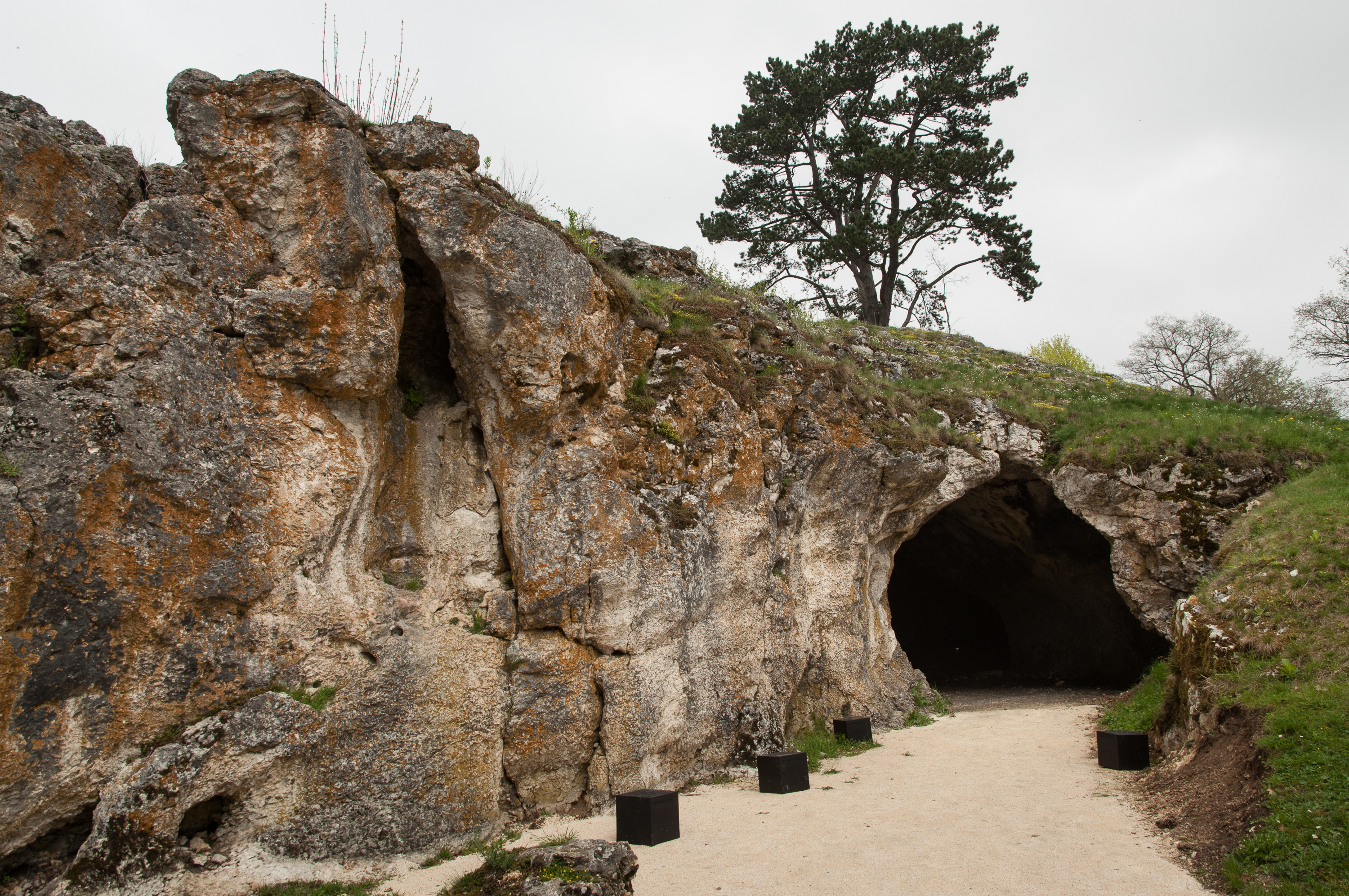 Außenansicht der Vogelherdhöhle im Lonetal bei Niederstotzingen, Blickrichtung von Süden nach Norden.